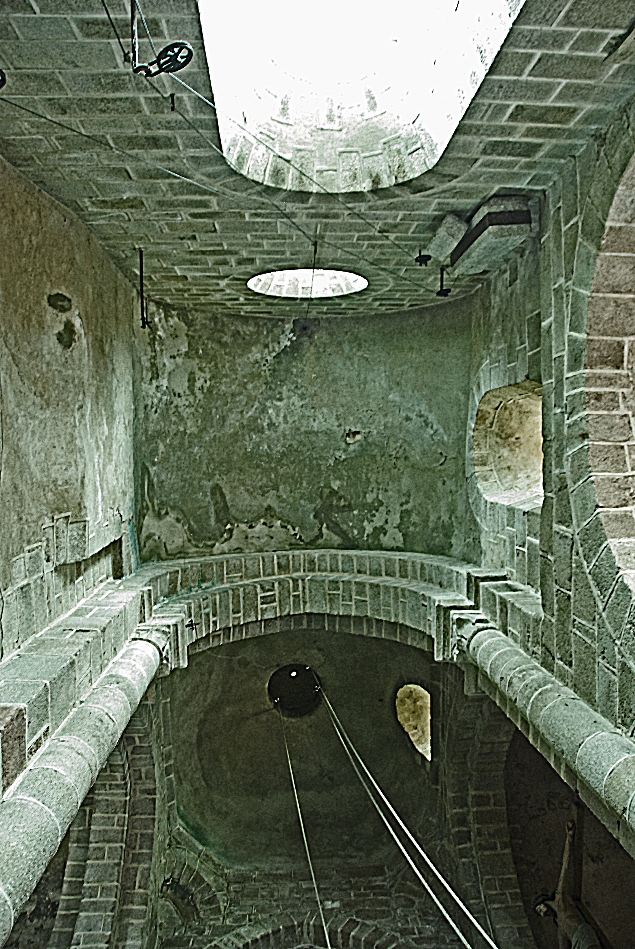 N.-D. de Châtel-Montagne, Gewölbe südl. Querhausarm